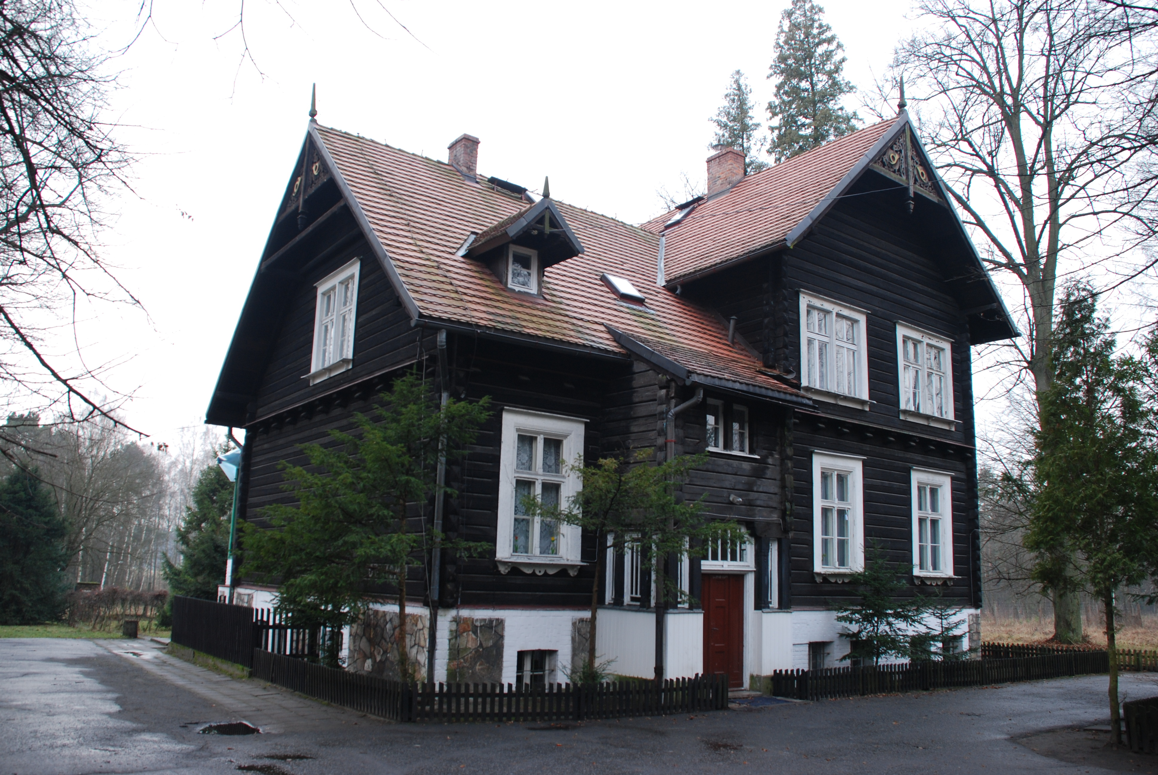 Miasteczko Śląskie (województwo śląskie), ul. Imielów 50 dawny dworek myśliwski 04.2012.